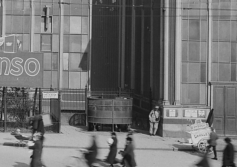 Paleis voor Volksvlijt: Zicht op het voormalig Paleis voor Volksvlijt